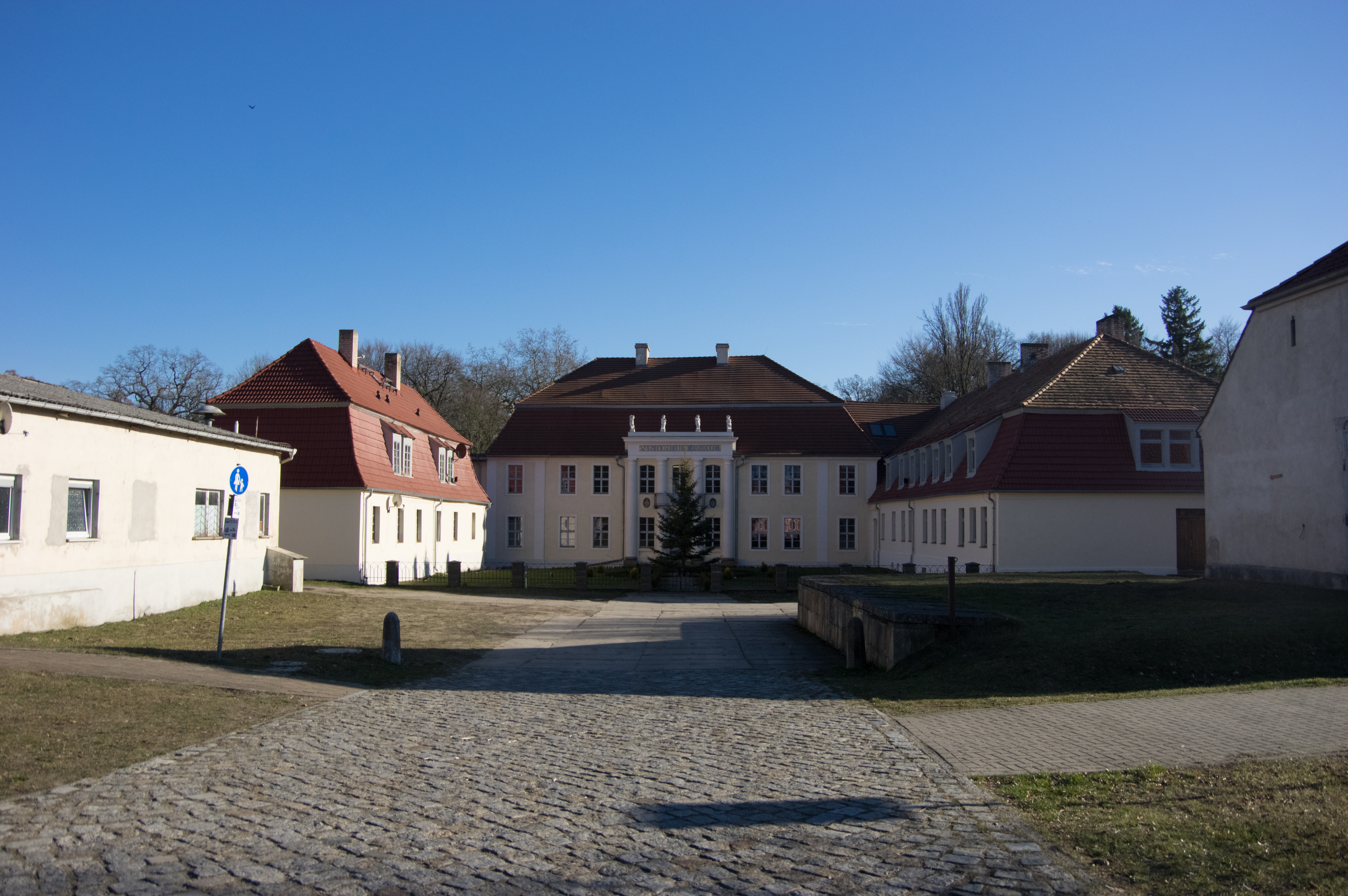 Gransee, Ortsteil Dannenwalde in Brandenburg. Das Herrenhaus steht unter Denkmalschutz. Es wurde frisch renoviert.